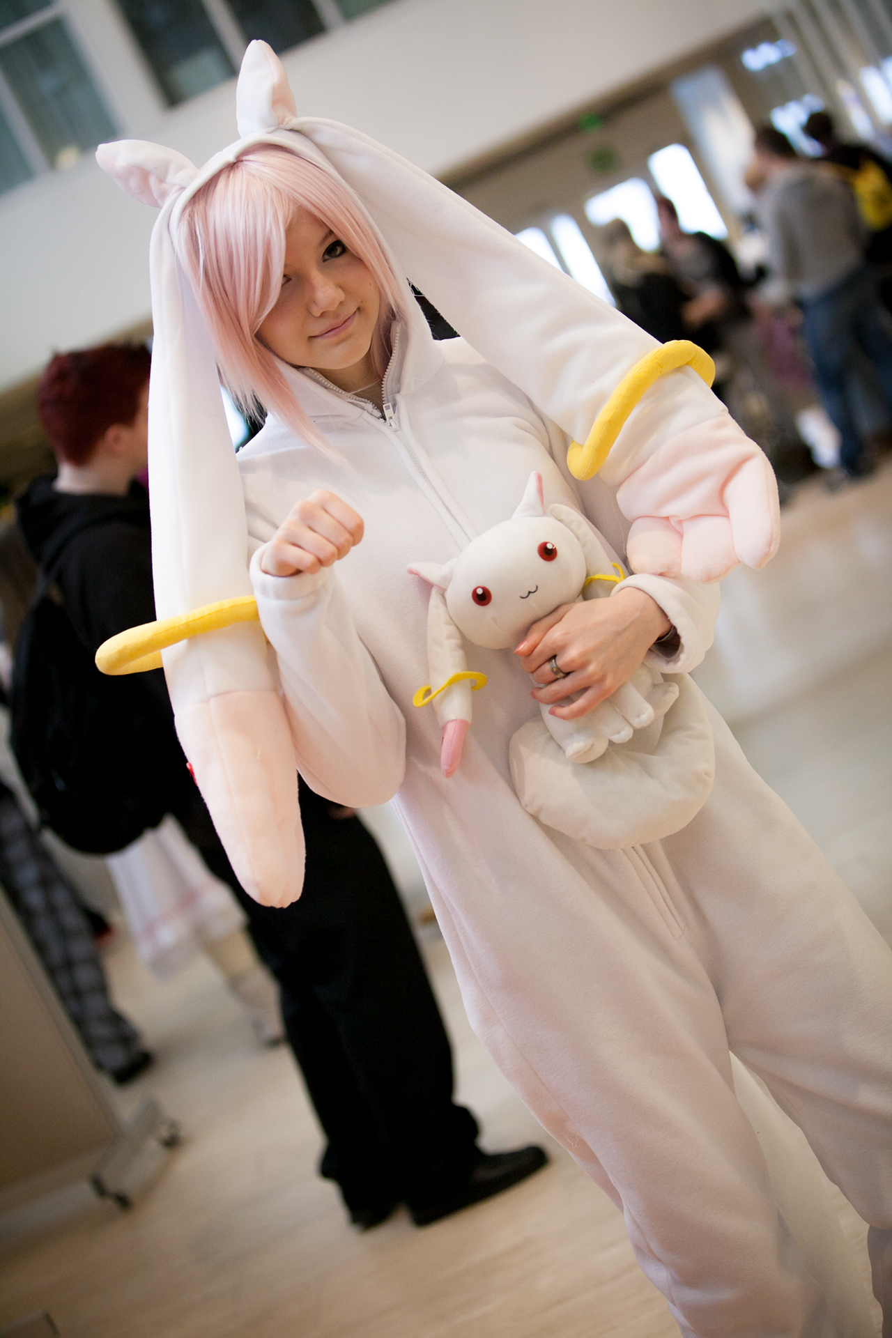 20140119124432IMG_5922